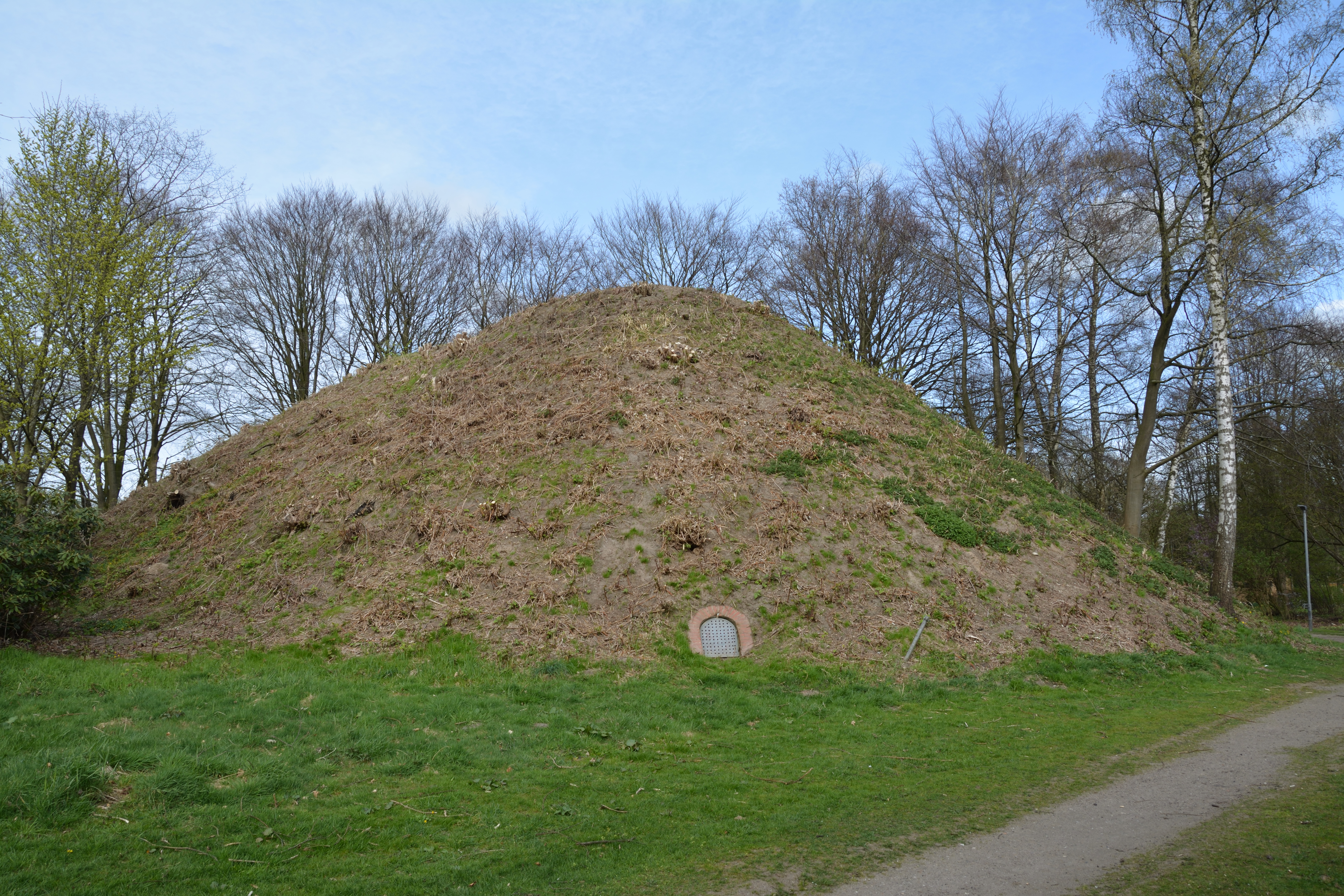 .Impressionen vom Germanengrab in Itzehoe im Frühjahr 2017. Daneben wurde ein Ganggrab aus Warringholz rekonstruiert.